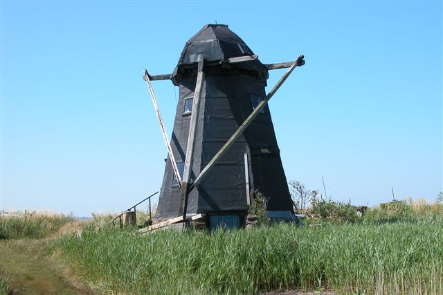 Hjortø